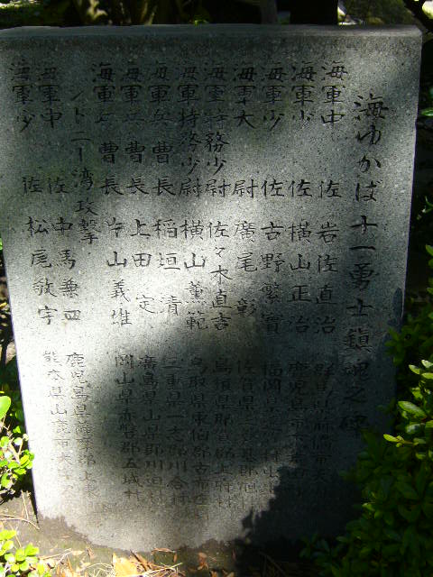 「海ゆかば」石碑-3